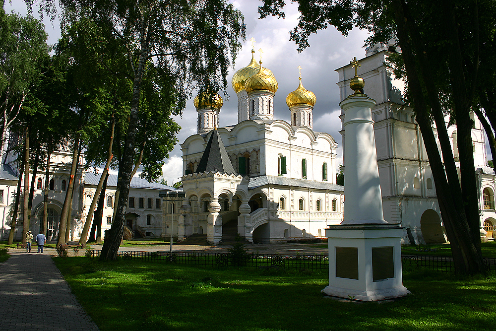 Innenaufnahme des Ipatios-Klosters 2005